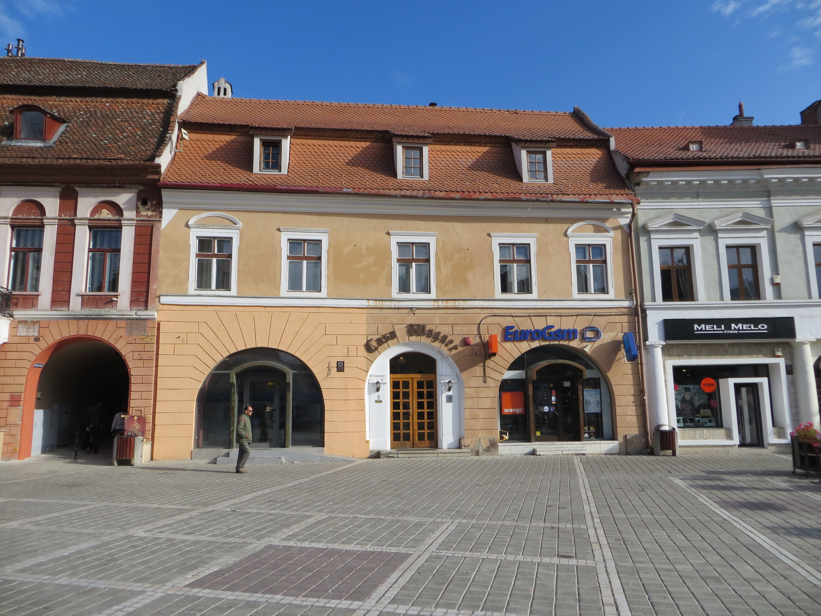 Casa Wallbaum